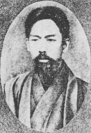 松野勇雄（1852-1893）